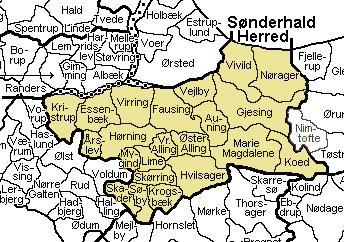 Sønderhald Herred, Gl Randers Amt, Denmark.